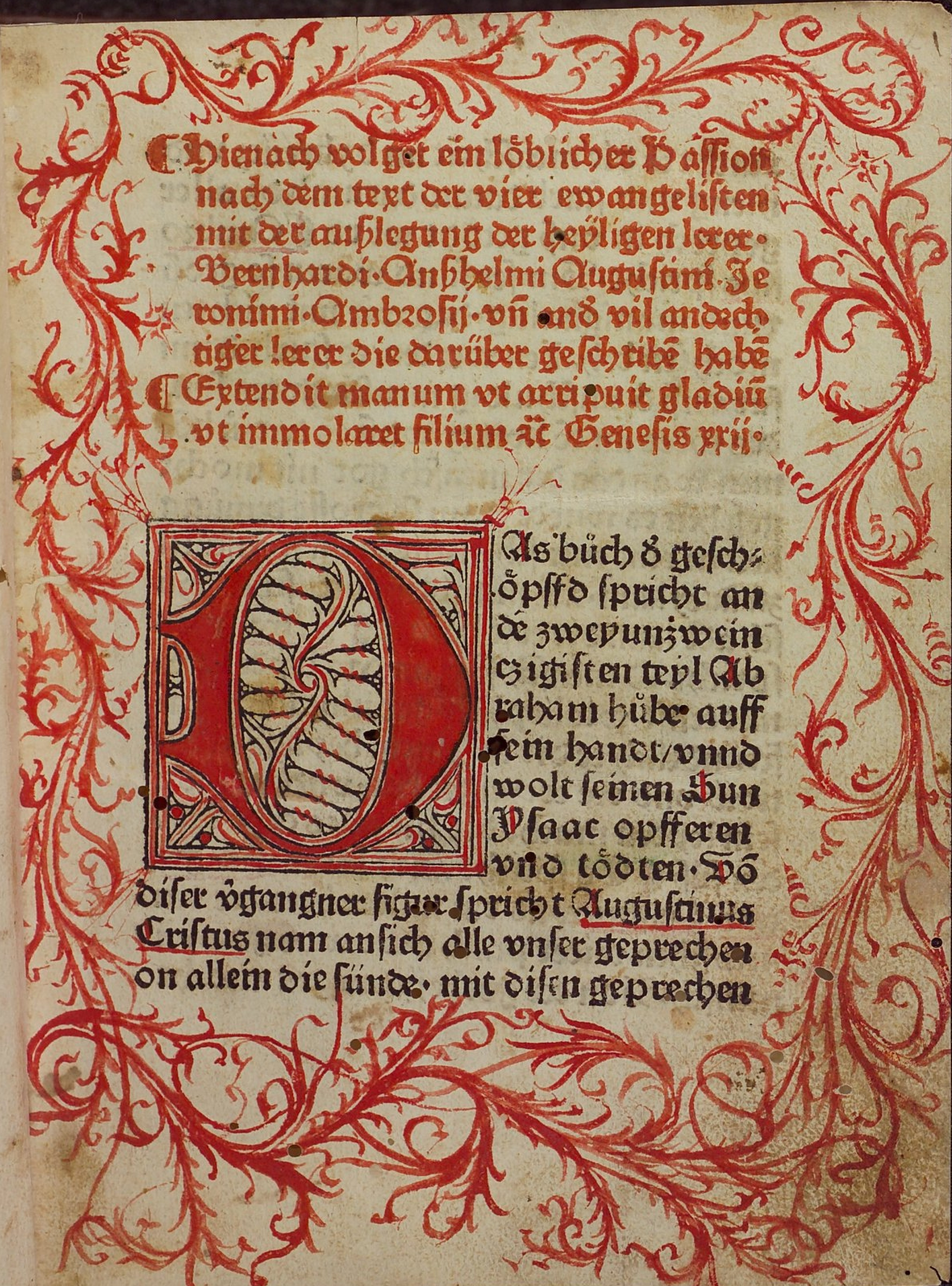 Heinrich [Passio domini Jesu Christi secundum quattuor Evangelia (dt.)] Passio domini Jesu Christi secundum quattuor Evangelia. - Augsburg : Sorg, 1480; (ger / dt.)